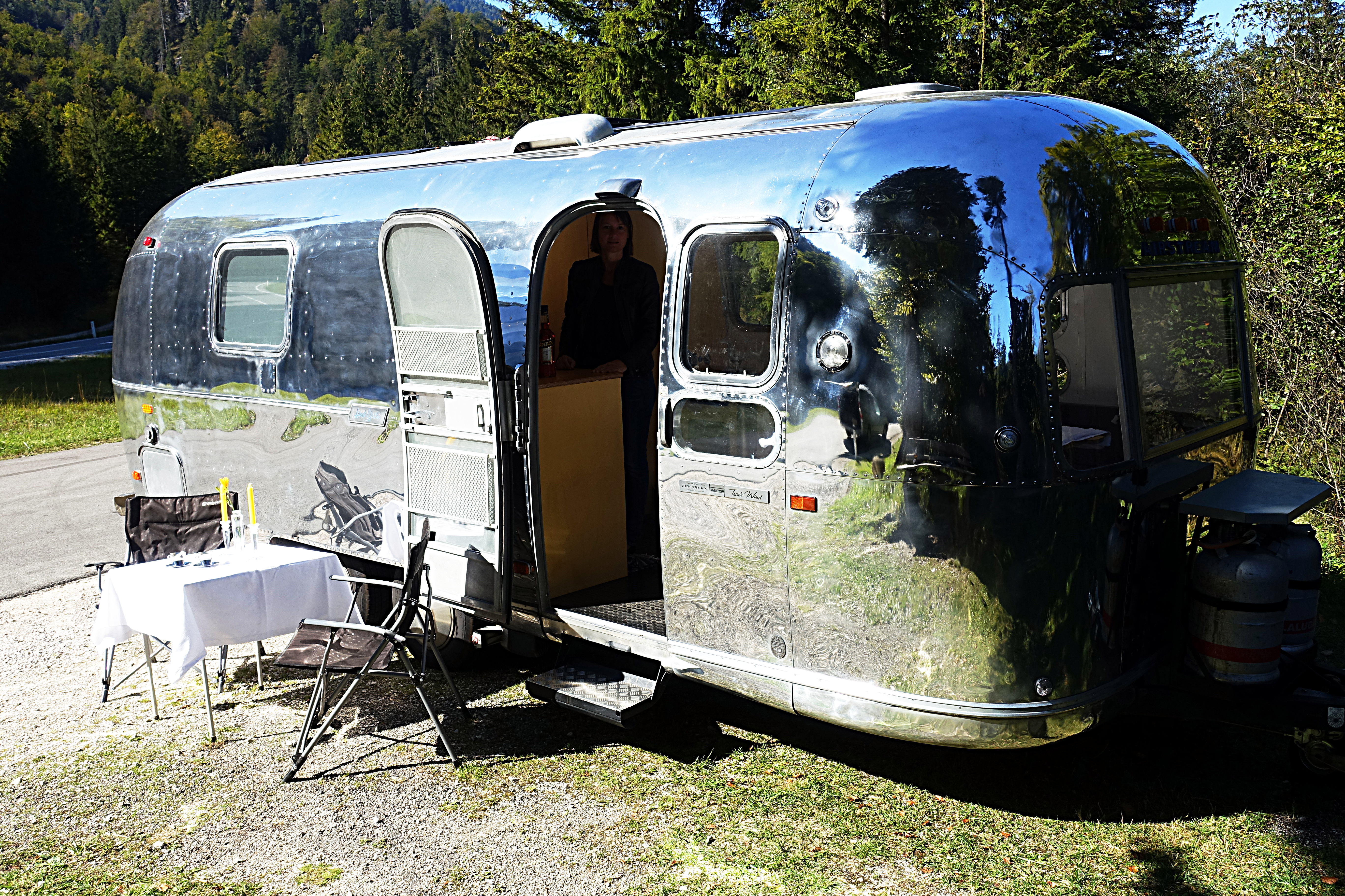 Airstream Hülle Hochglanz